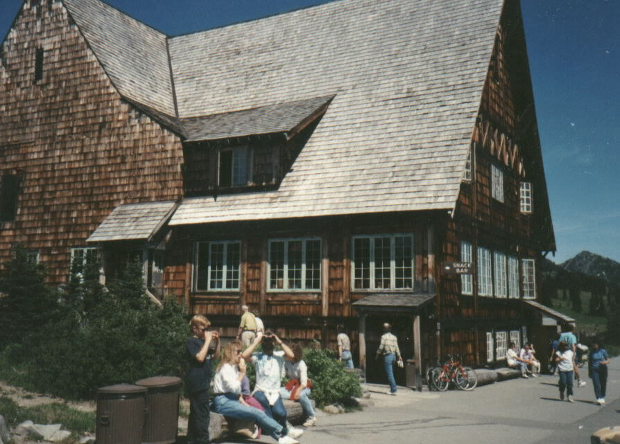 Sunrise Lodge Mt. Rainier 1991